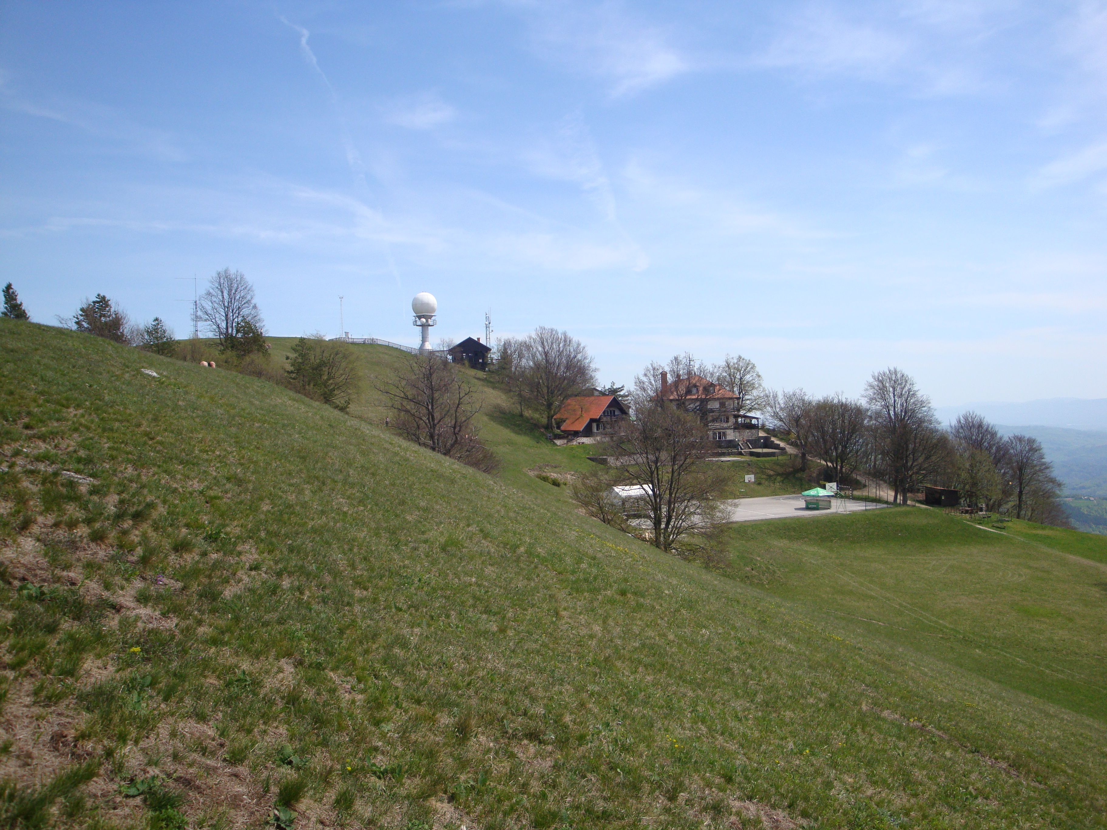 Vrh Lisce, Slovenija.